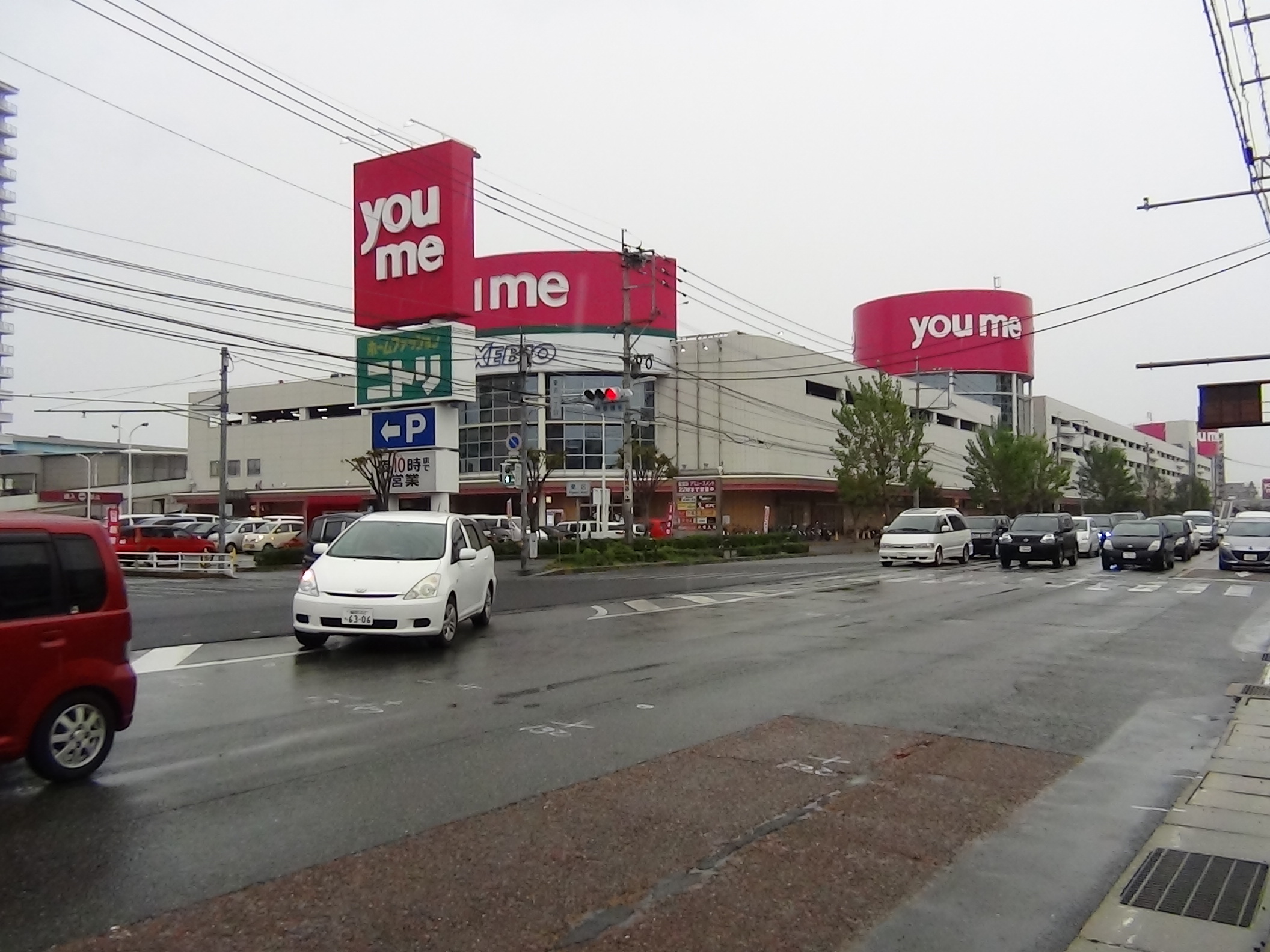 2012年11月4日、投稿者自身が撮影。